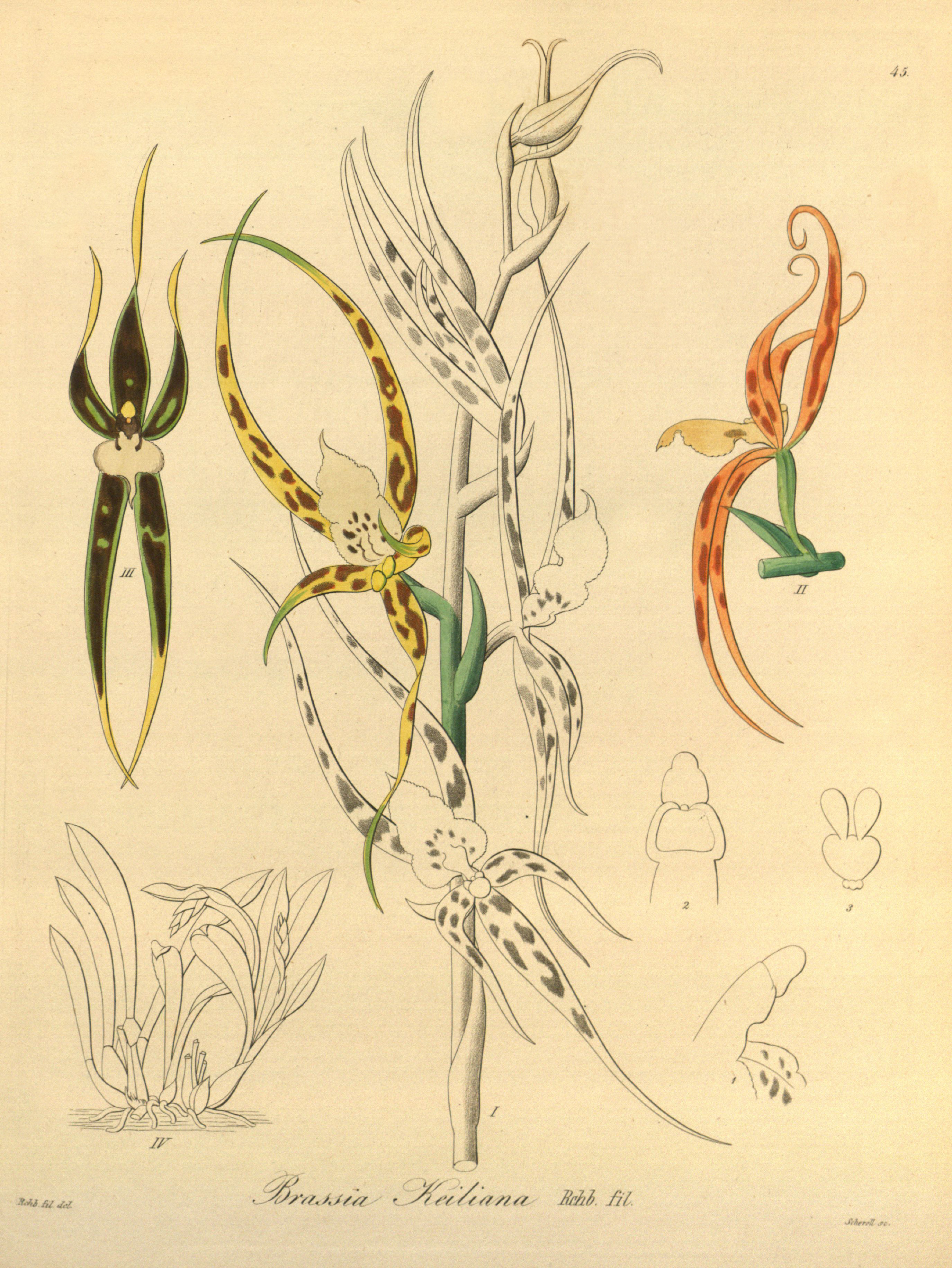 Illustration of Ada keiliana (as syn. Brassia keiliana)